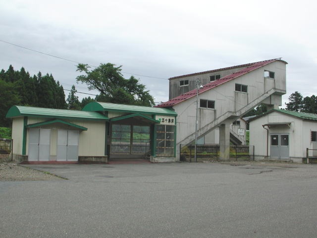 JR五十島駅